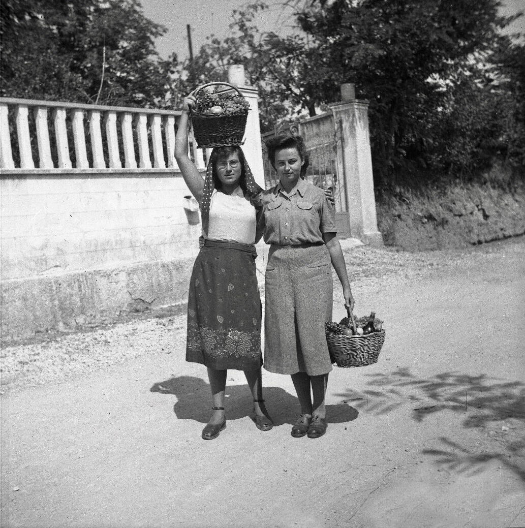 Jagodičeva in Beranova pred odhodom v Ljubljano.